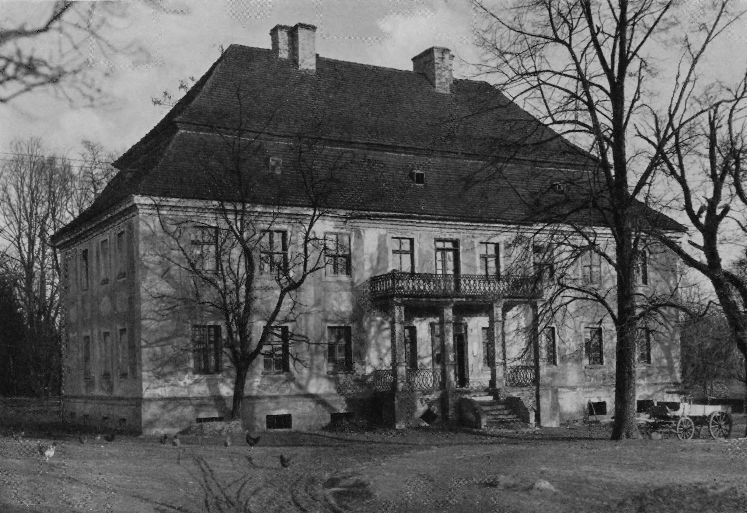 Gutshaus in Boroschau in Oberschlesien.